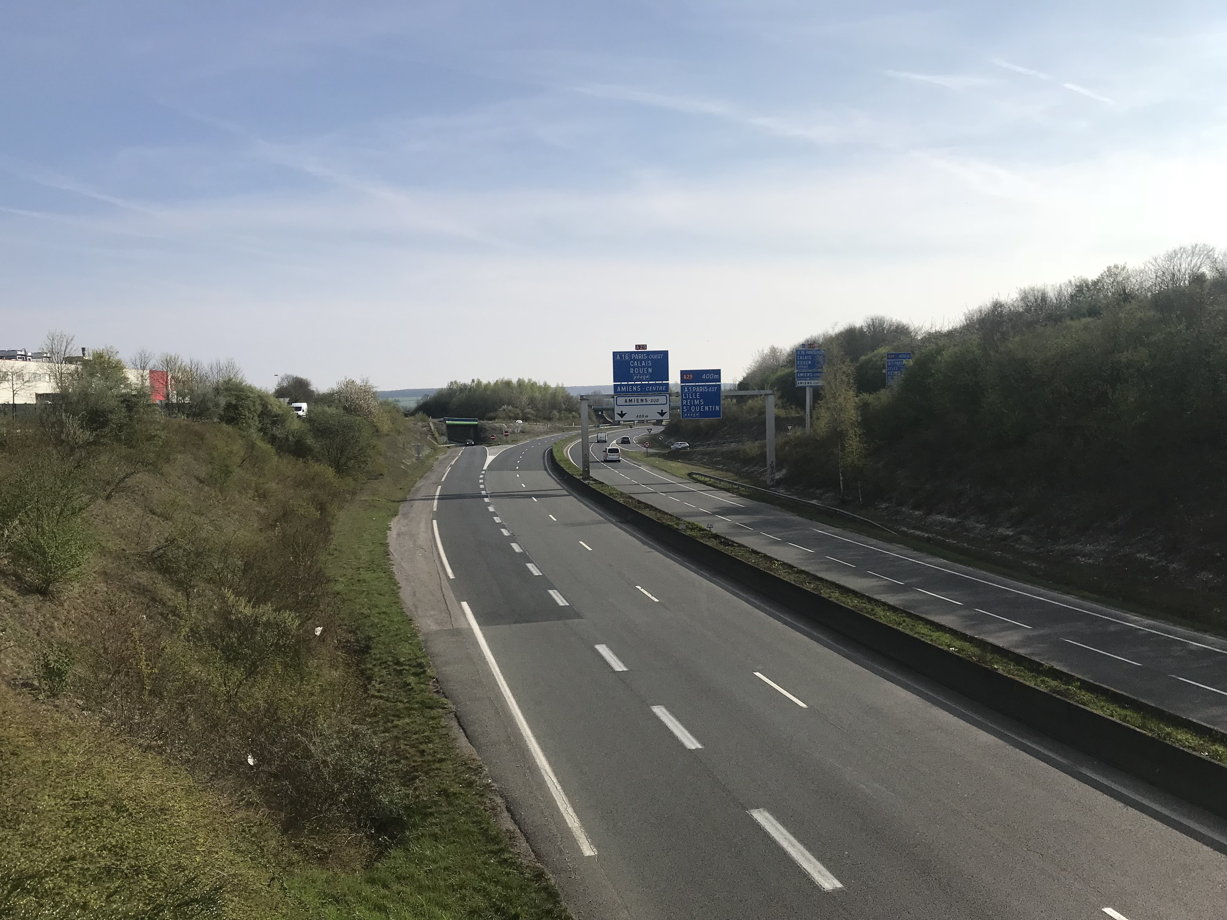 Rocade d'Amiens